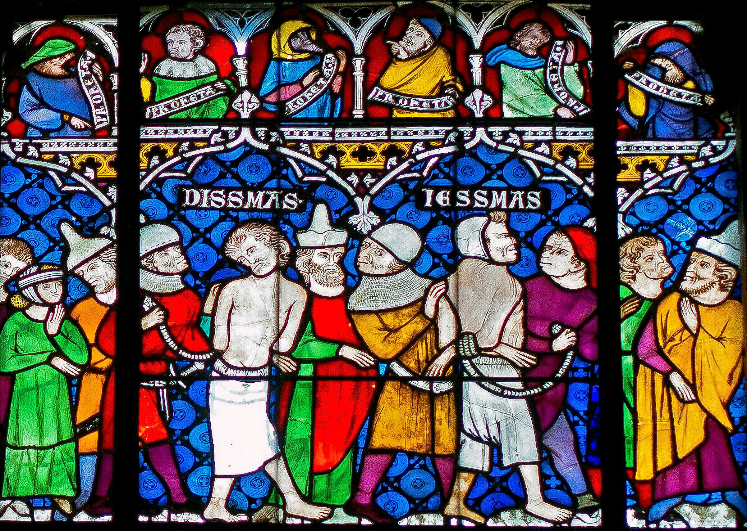 Gesmas und Dismas, die beiden Schächer. Südliches Seitenschiff, 3.Fenster, 12.Scheibe (Passionsfenster)